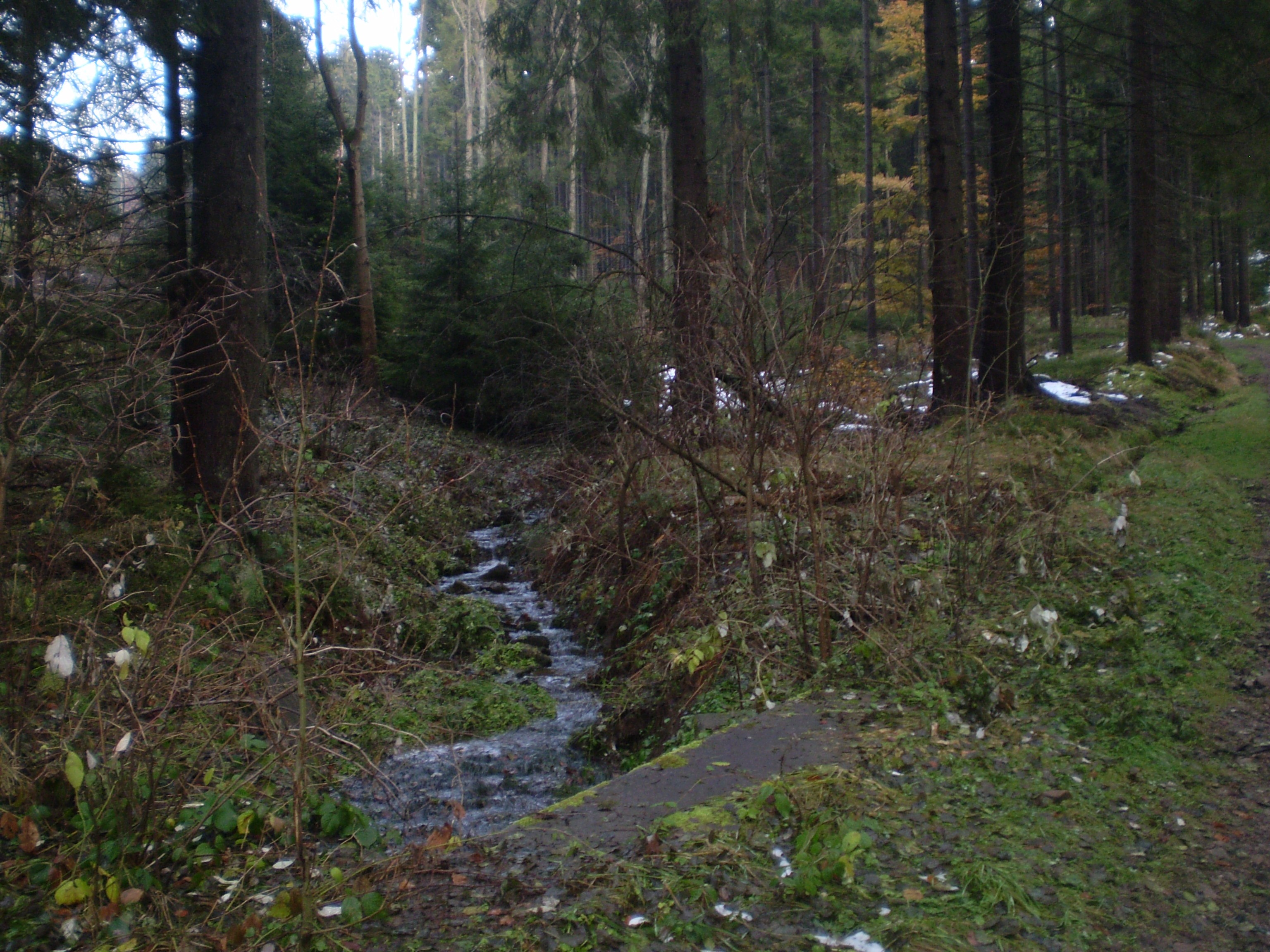 Uhelný důl v Orlických horách - Těchonínský potok